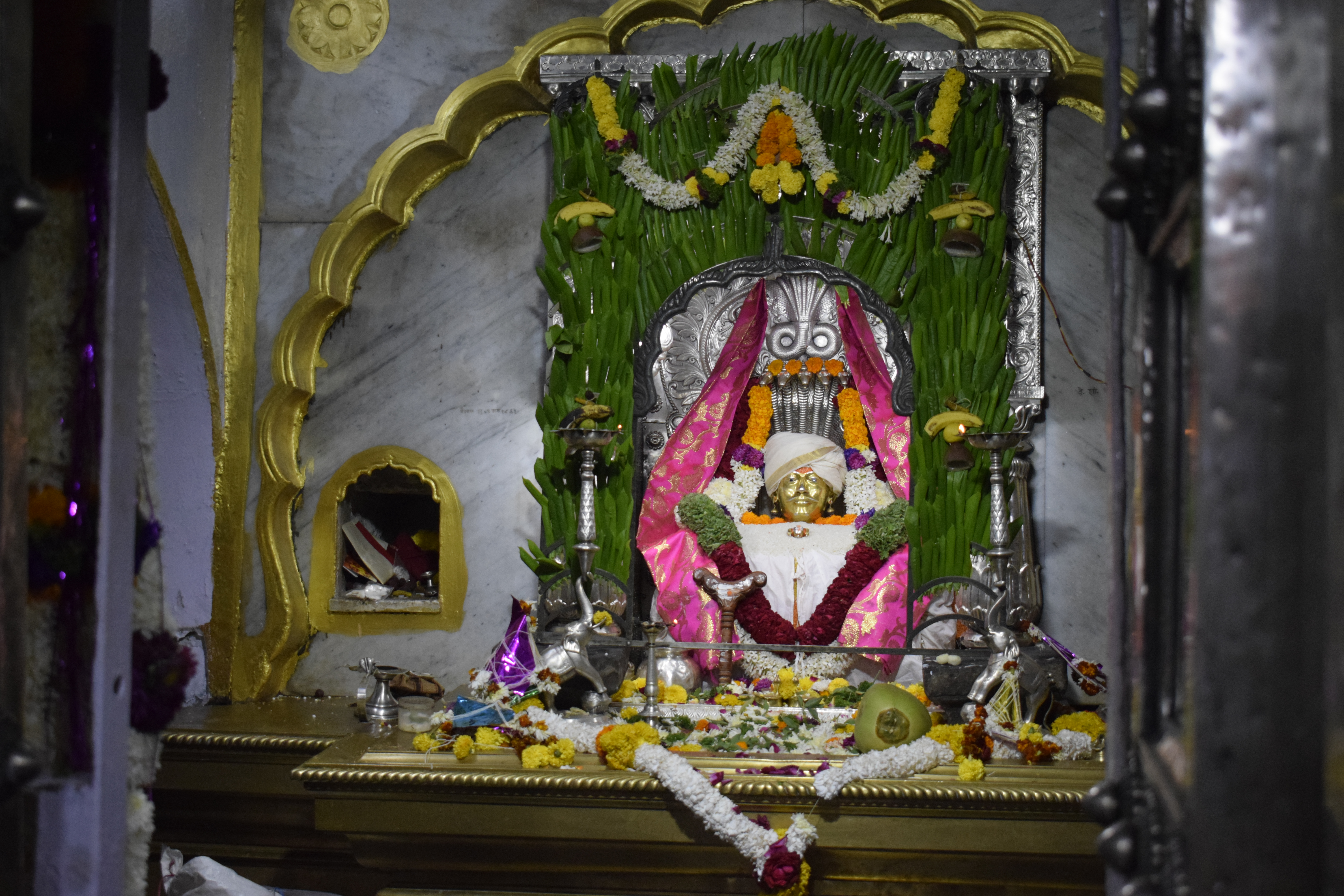 श्री. सिद्धेश्वर जत्रा,मकर संक्रांति,गड्डा यात्रा सोलापूर